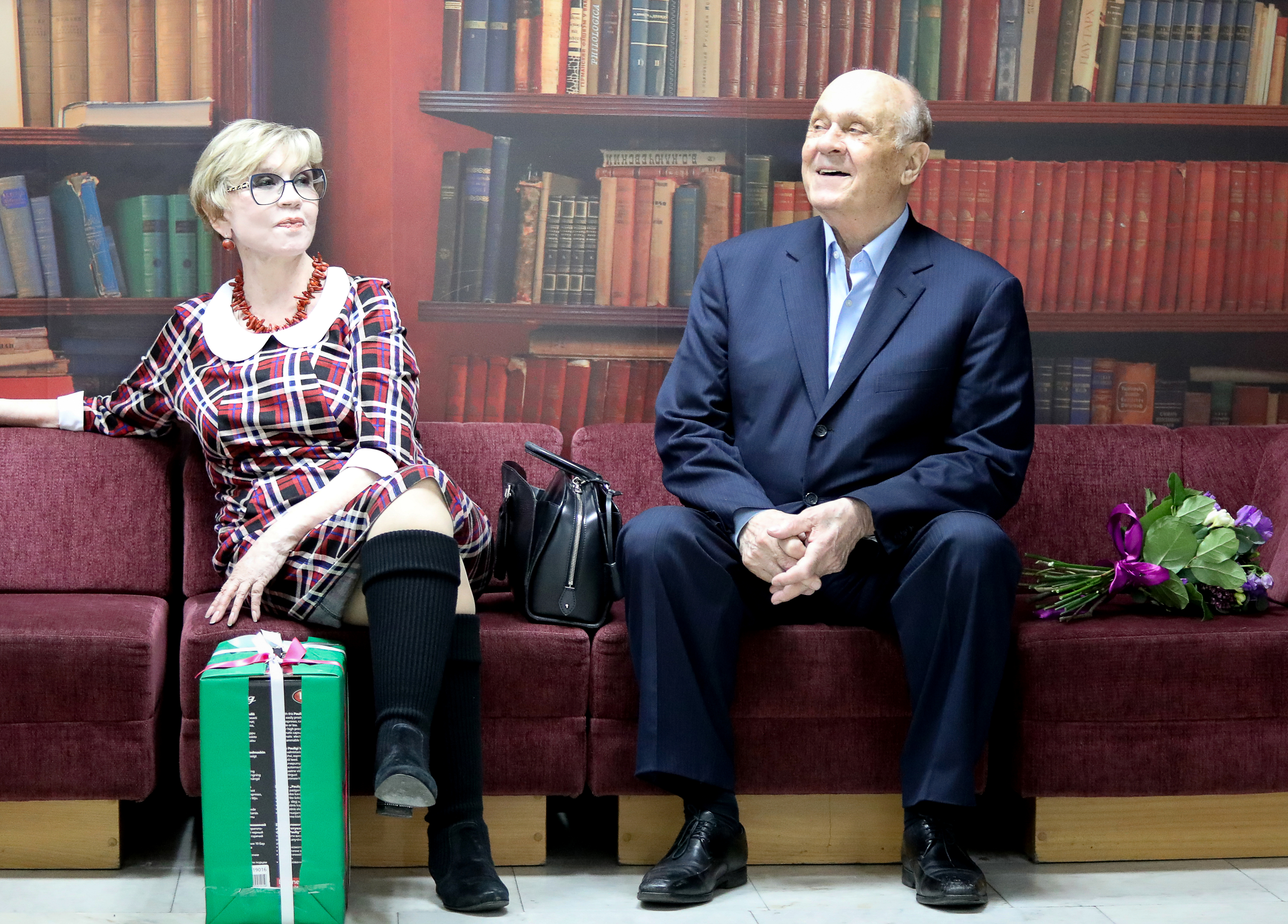 Вера Алентова и Владимир Меньшов в Российской государственной детской библиотеке.